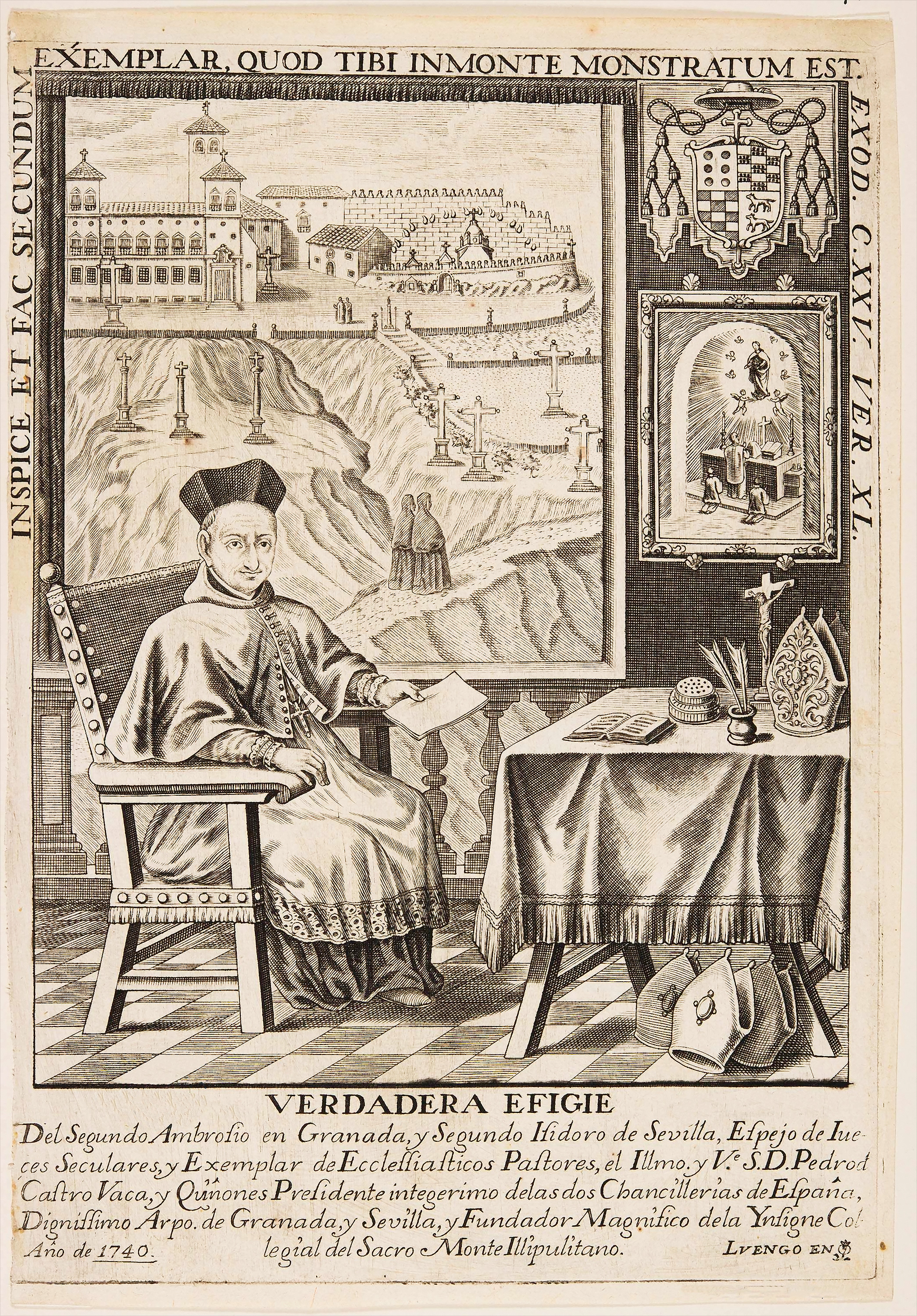 Retrato de Pedro de Castro y Quiñones. Al fondo vista de la Abadía del Sacromonte por él fundada.